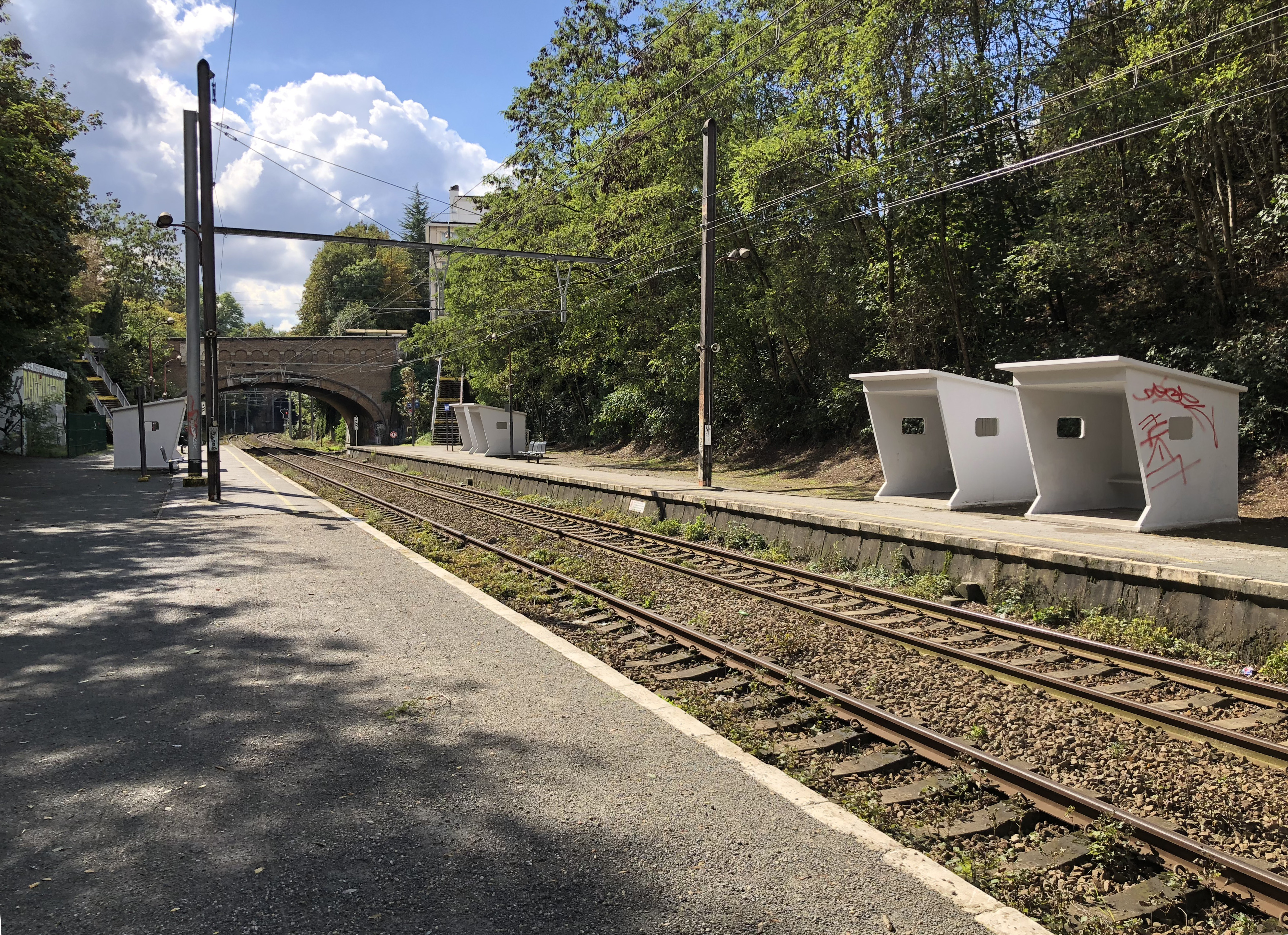 SNCB-NMBS Boondael train station